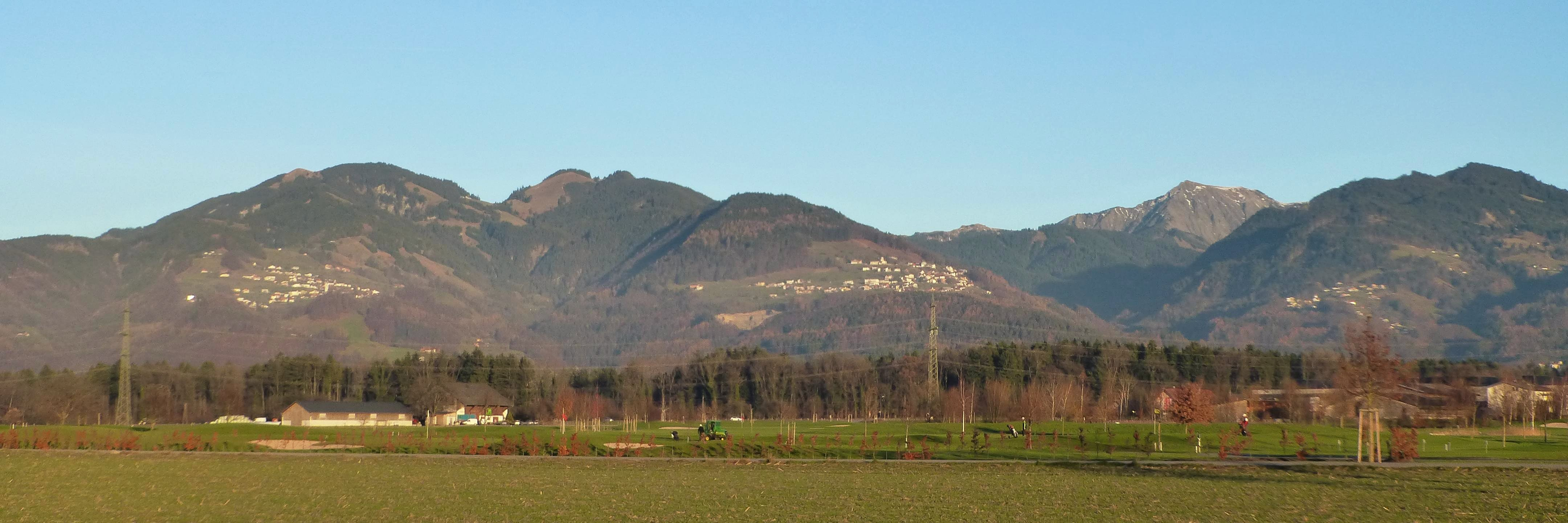 Blick von Brederis auf die Bergdörfer Fraxern, Viktorsberg und Dafins am Westhang des Bregenzerwaldgebirges